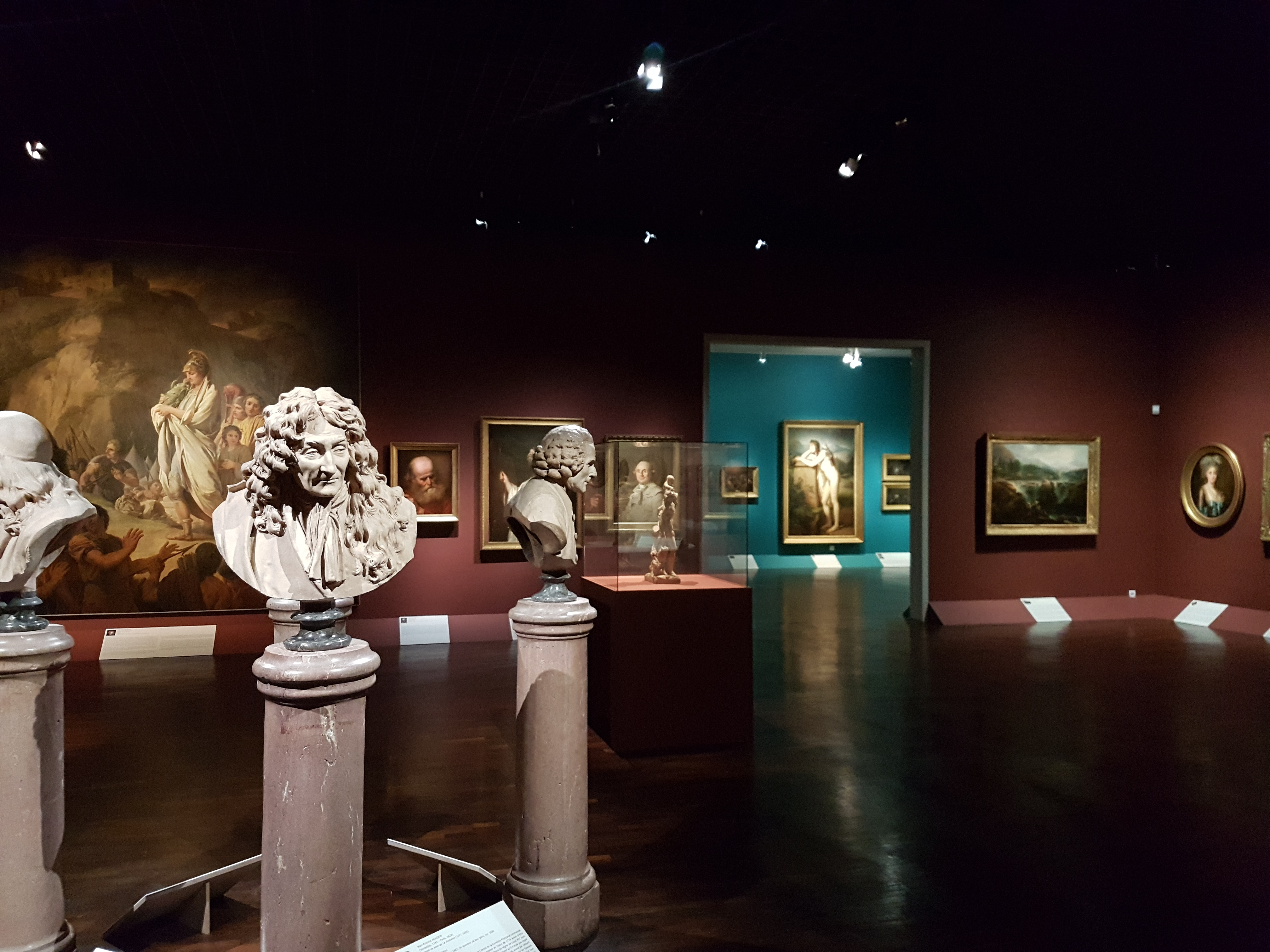 Vue de la salle consacrée au retour à l'Antique dans le parcours rénové des collections mené en 2018.